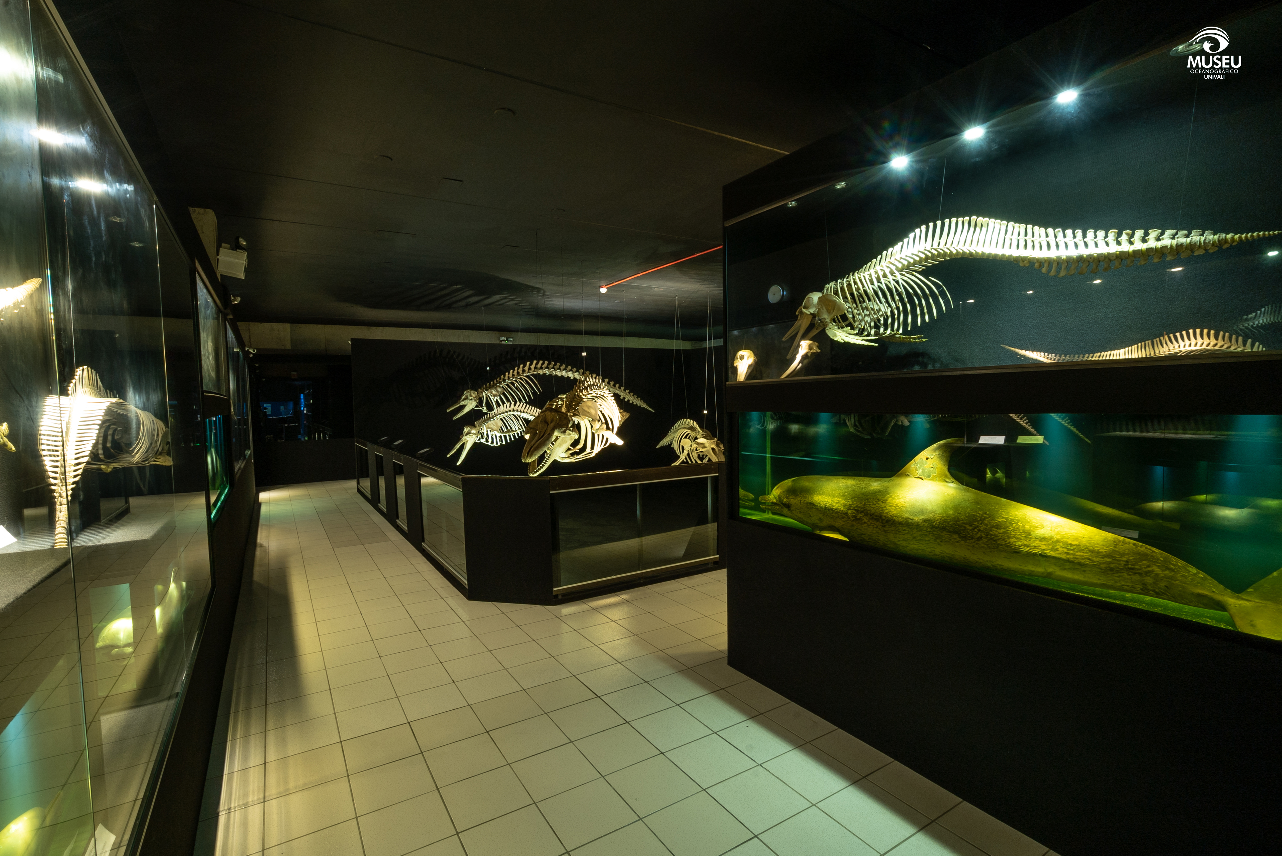 Vista parcial da Ala dos Mamíferos Marinhos do Museu Oceanográfico Univali, com diversos esqueletos e animais conservados em tanques de vidro